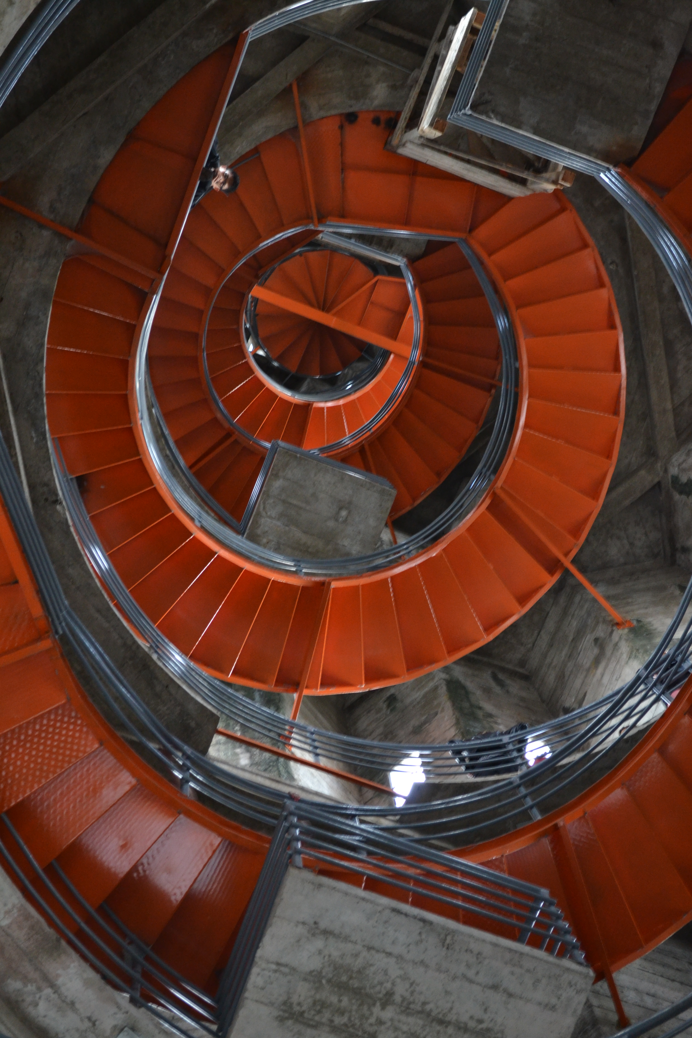 Escaleras de acceso al Corredor Polaco.